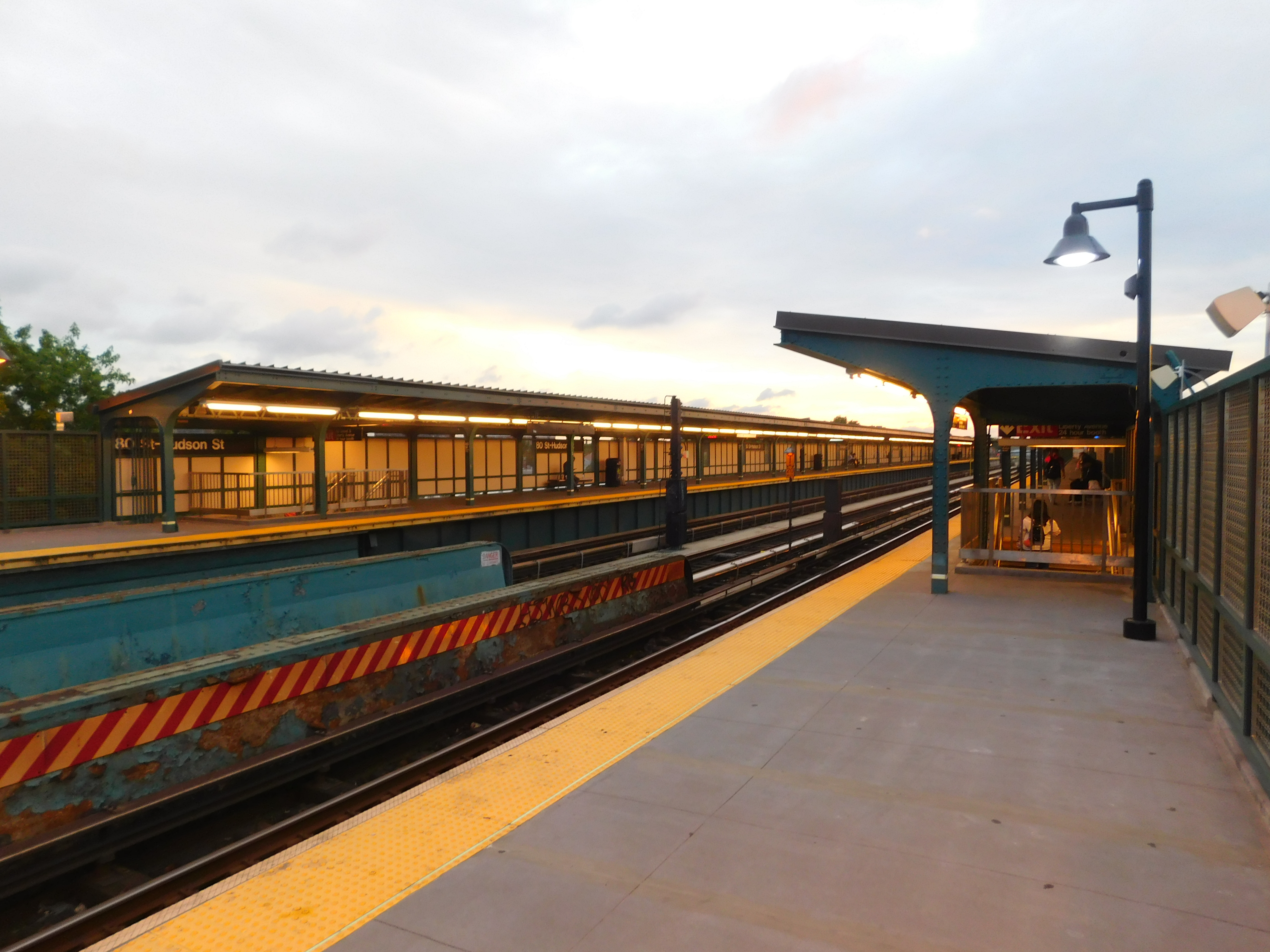 Ozone Park, Queens